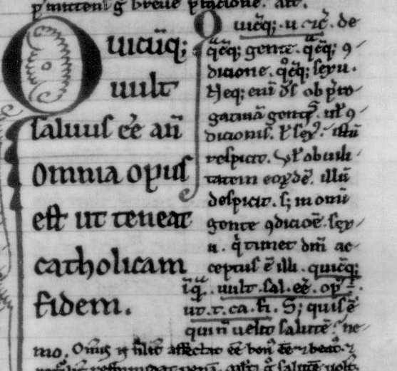 Сочинение Симо Торначенсис Symo Tornacensis, Трактат о Символе Quicumque Tractatus super symbolum «Quicumque», рукопись 1201 - 1300, Аббатство Сен-Мор Abbaye de Saint-Maur.